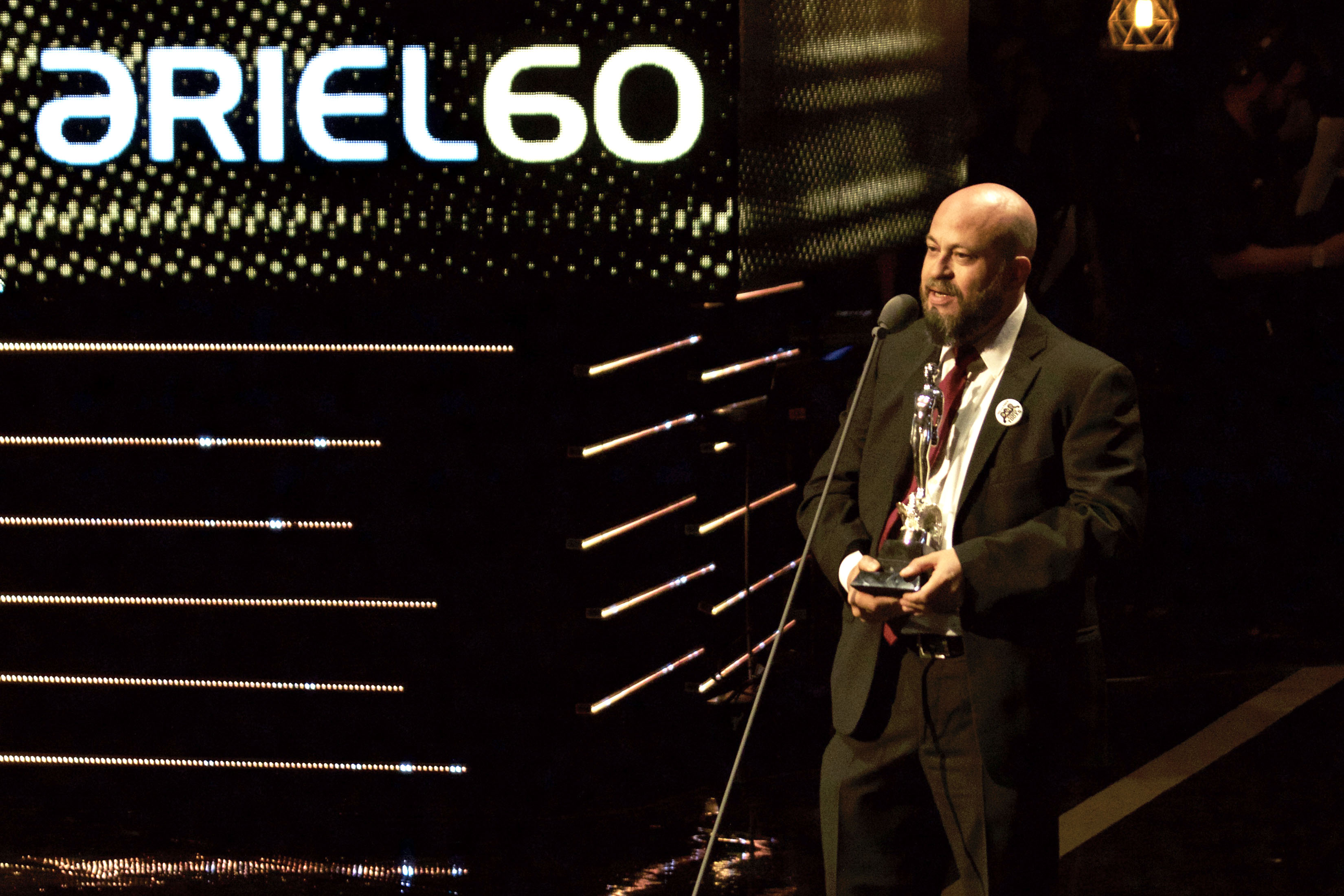 Mejor Largometraje Documental para La Libertad del Diablo de Everardo González.